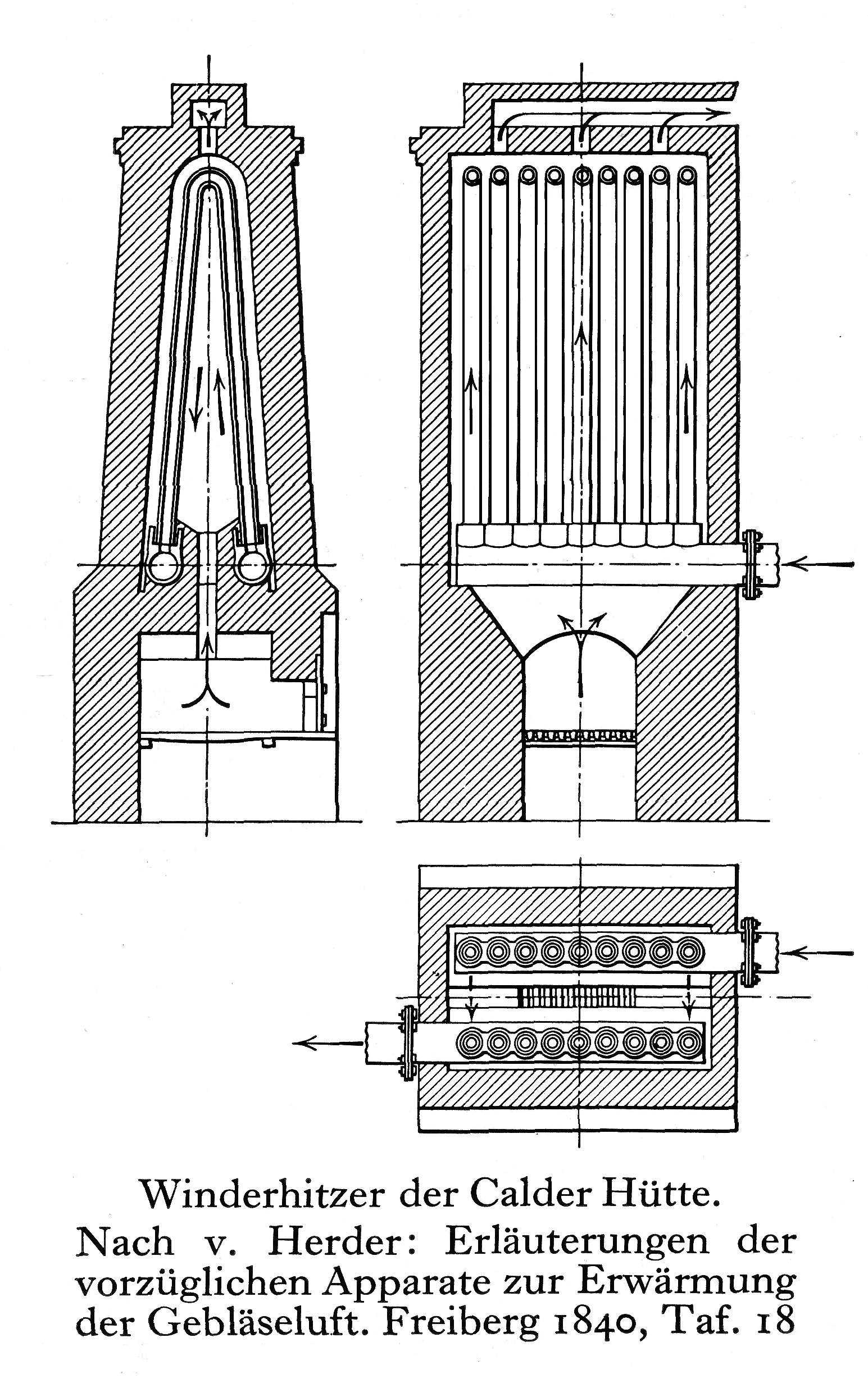 Heberöhren- oder Hosenröhren- Winderhitzer (auch Calder-Apparat) von James Beaumont Neilson Original Beschreibung: Winderhitzer der Calder-Hütte. Nach v. Herder: Erläuterung der vorzüglichen Apparate zur Erwärmung der Gebläseluft. Freiburg 1840, Tafel 16